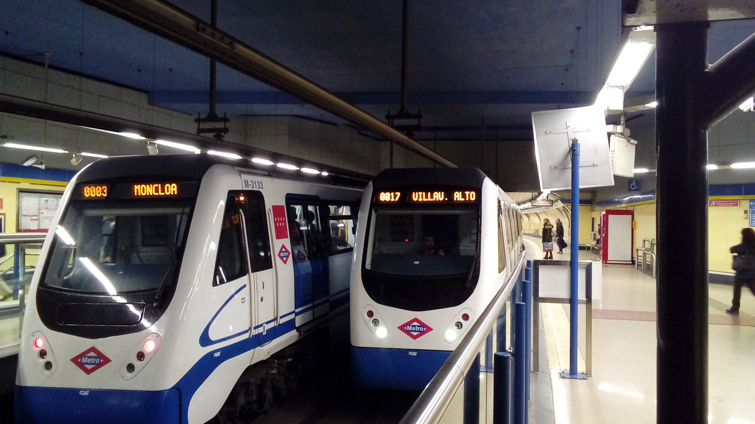 Dos trenes de la serie 3000 estacionados en Lavapiés, Línea 3 del Metro de Madrid. Foto tomada con el túnel hacia Embajadores a la espalda.